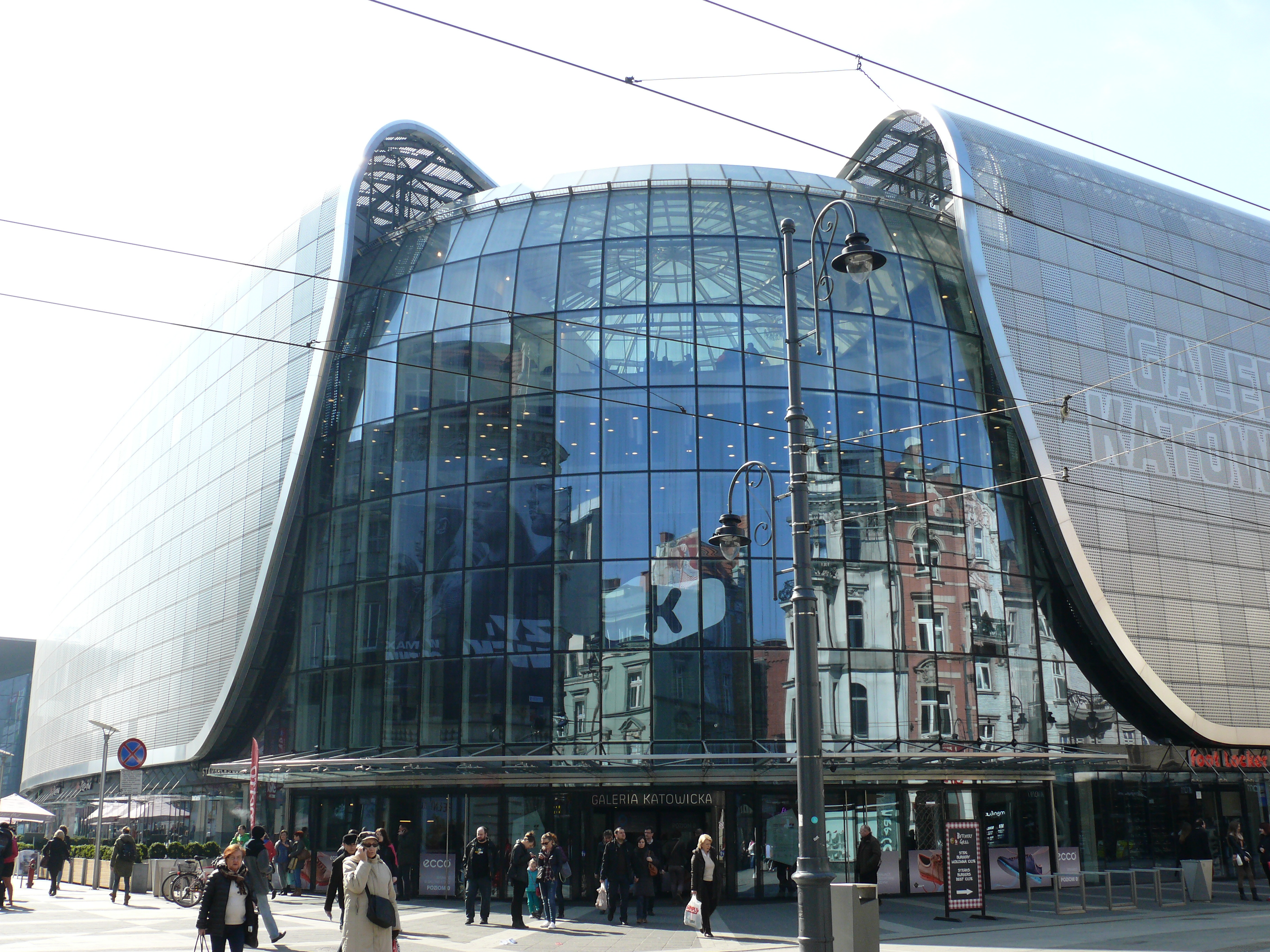 Haupteingang der Galeria Katowicka, einem Einkaufszentrum am Hauptbahnhof.